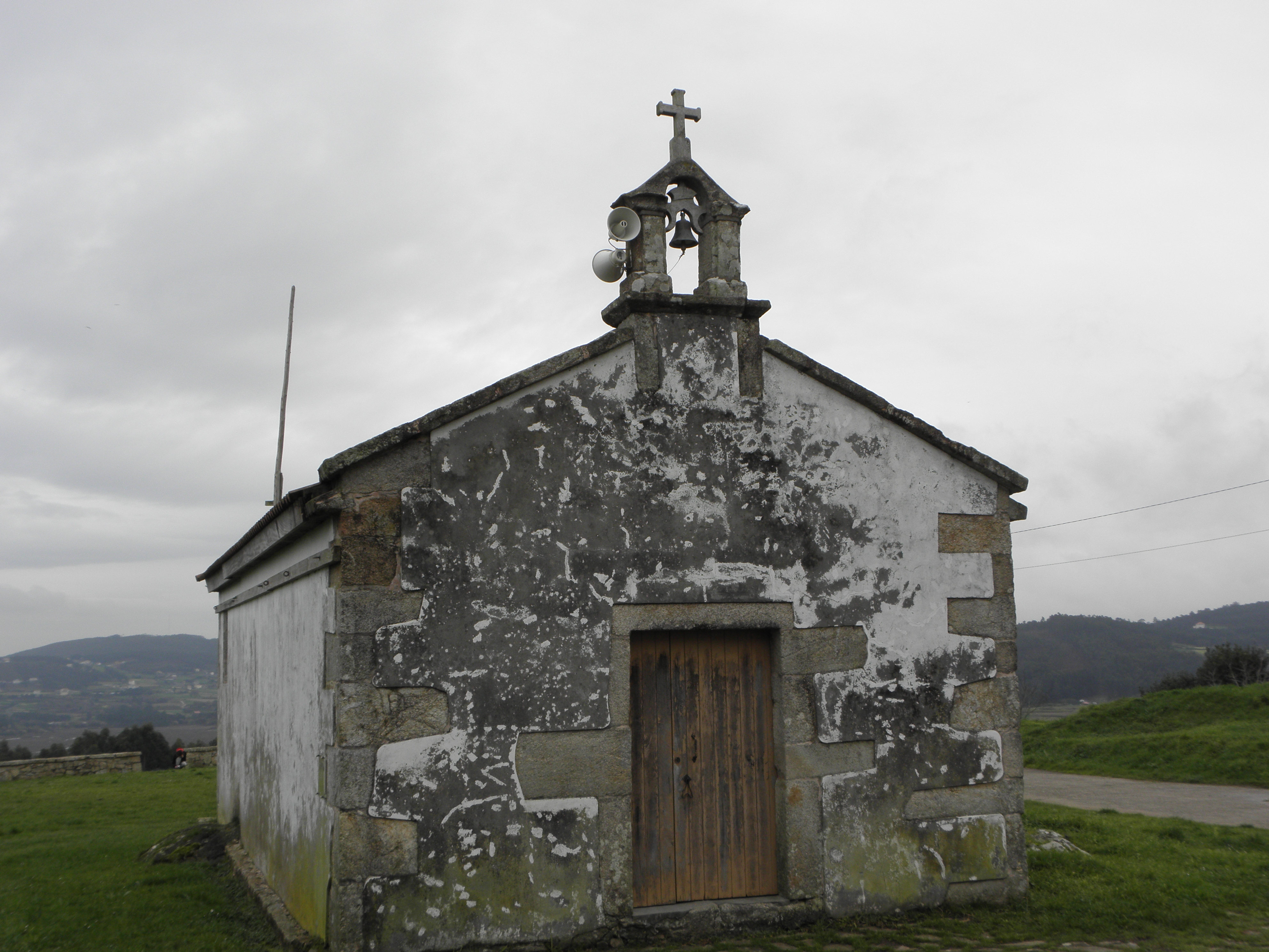 Encontrase no miradoiro de Santa Irene, dende o que se aprecia a lagoa e areal de Baldaio (Carballo)